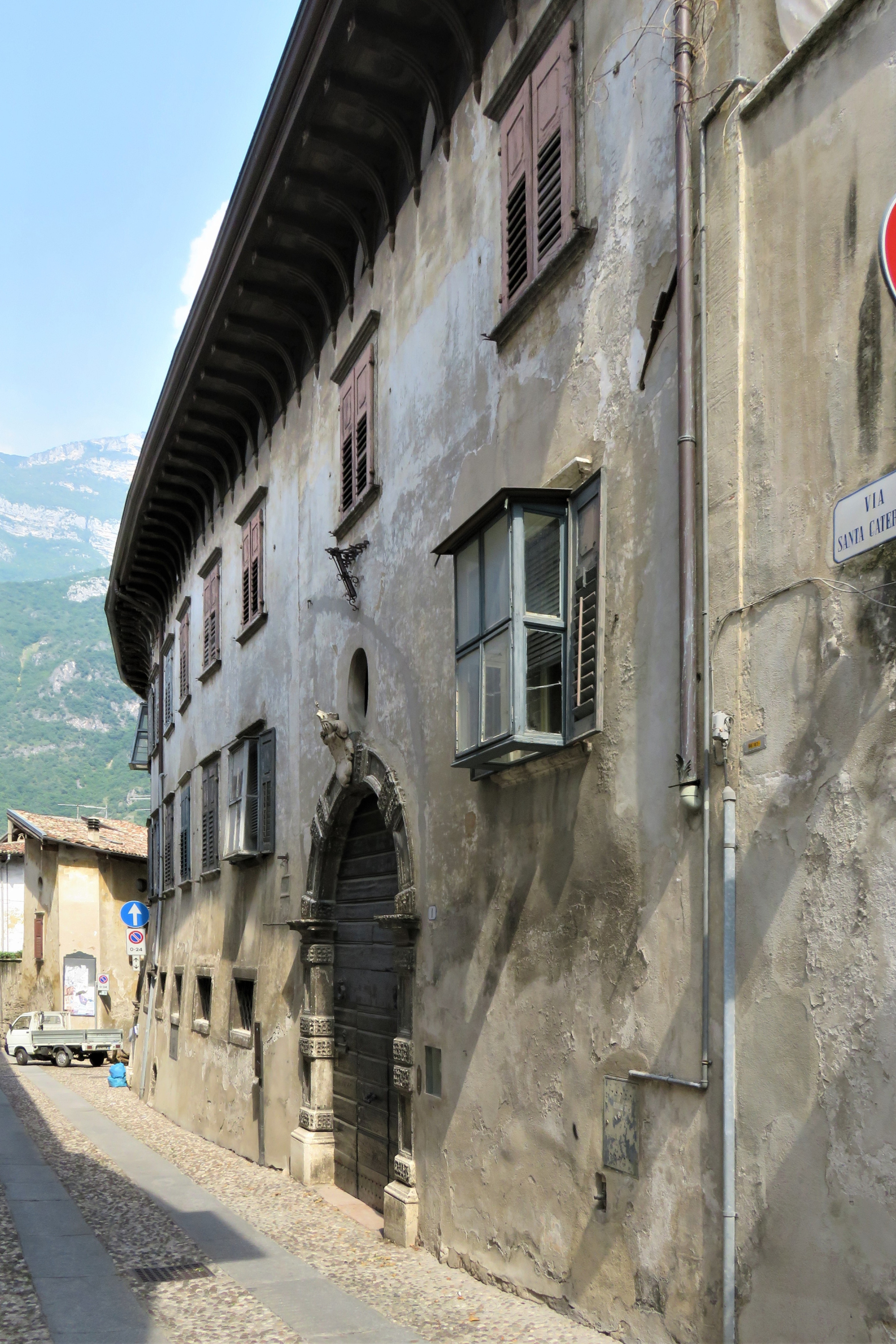 Palazzo Pizzini ad Ala, Trentino. Esterno.